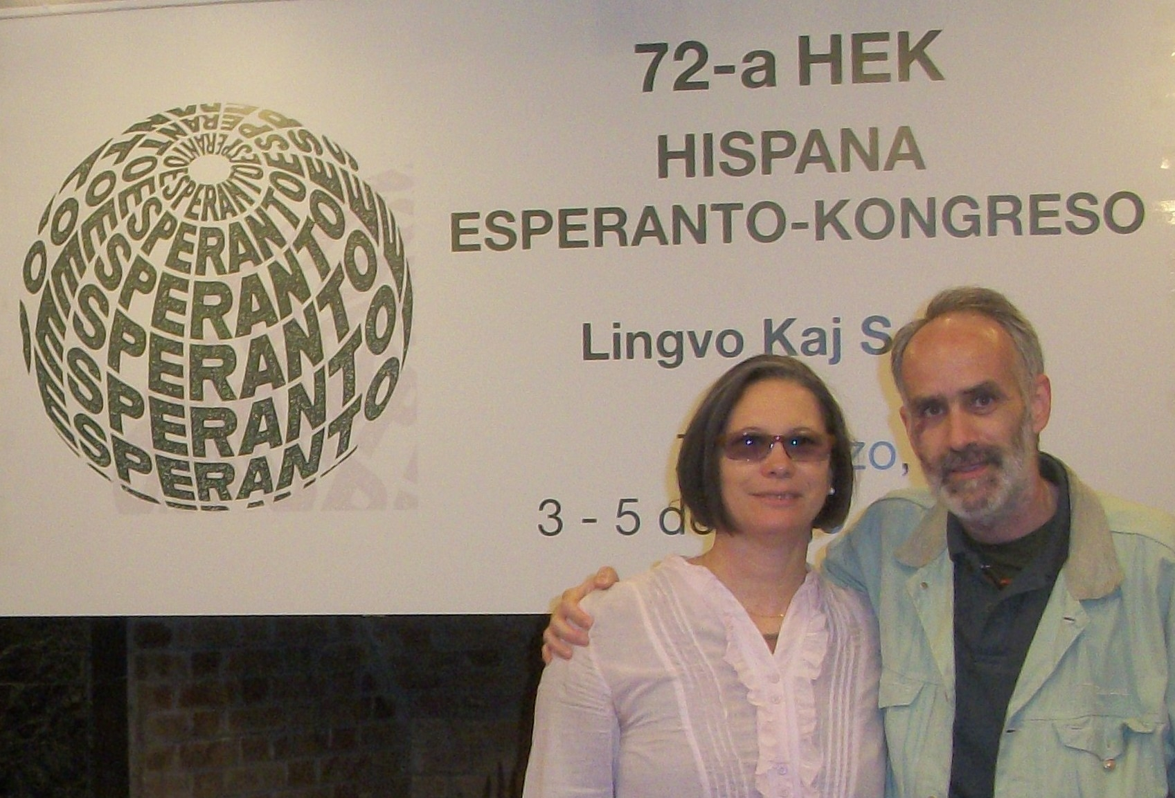 Lorenzo Noguero kun sia kunulino Eunice Alberto Moysés en la 72-a Hispana Kongreso de Esperanto